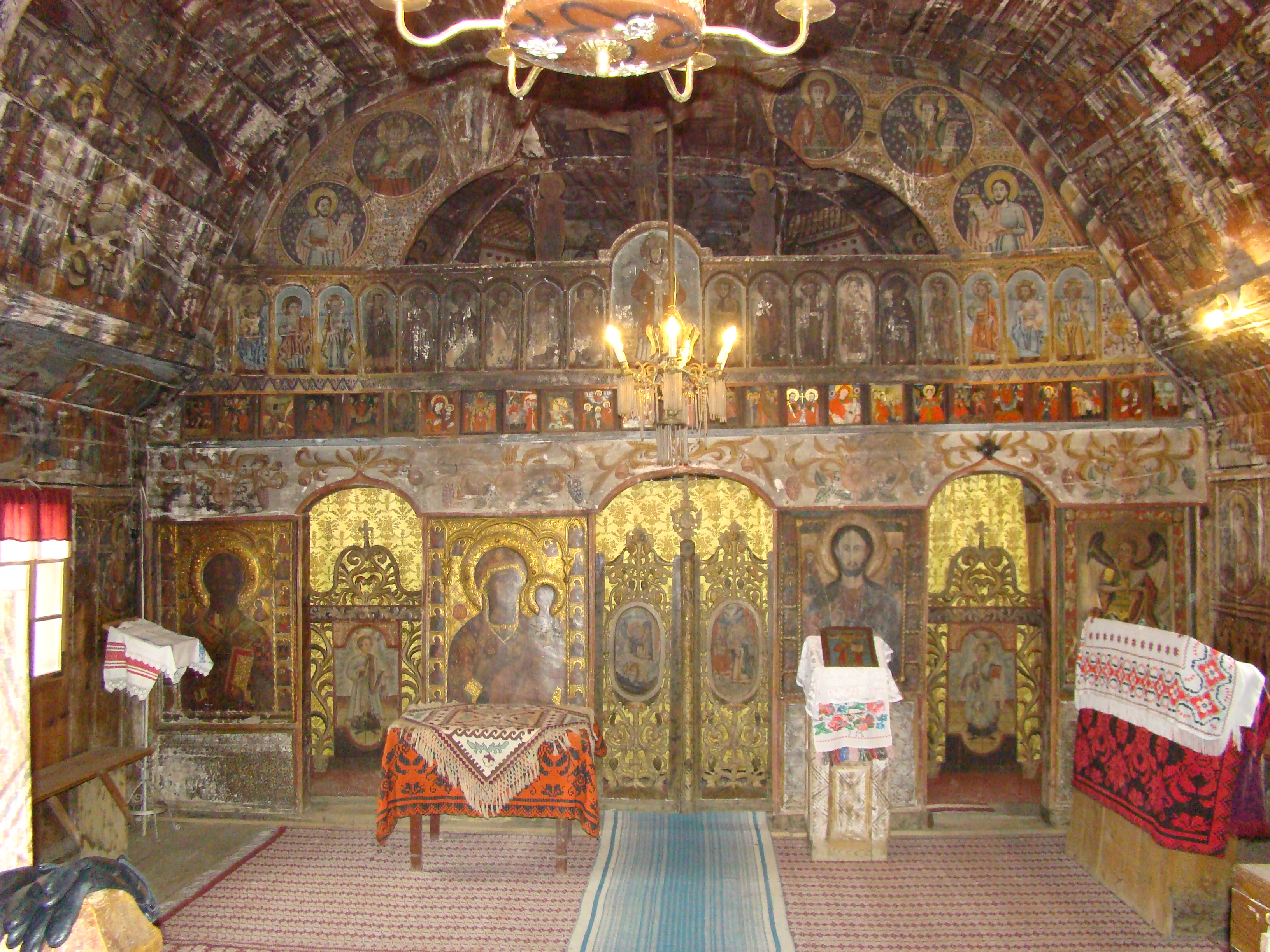 Urișiu de Jos, Mureș